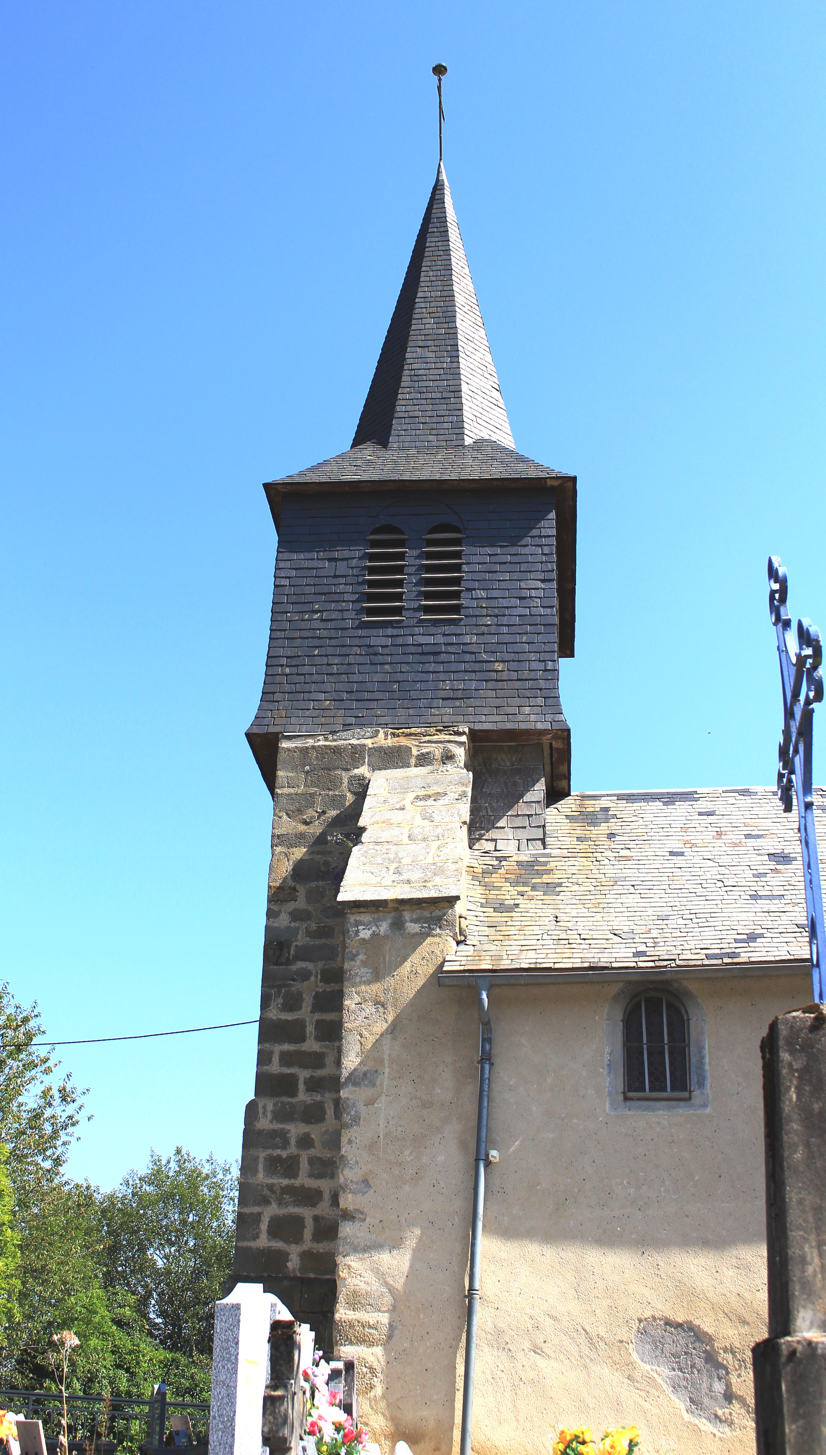 Église Saint-Pierre-aux-Liens d'Escots (Hautes-Pyrénées)